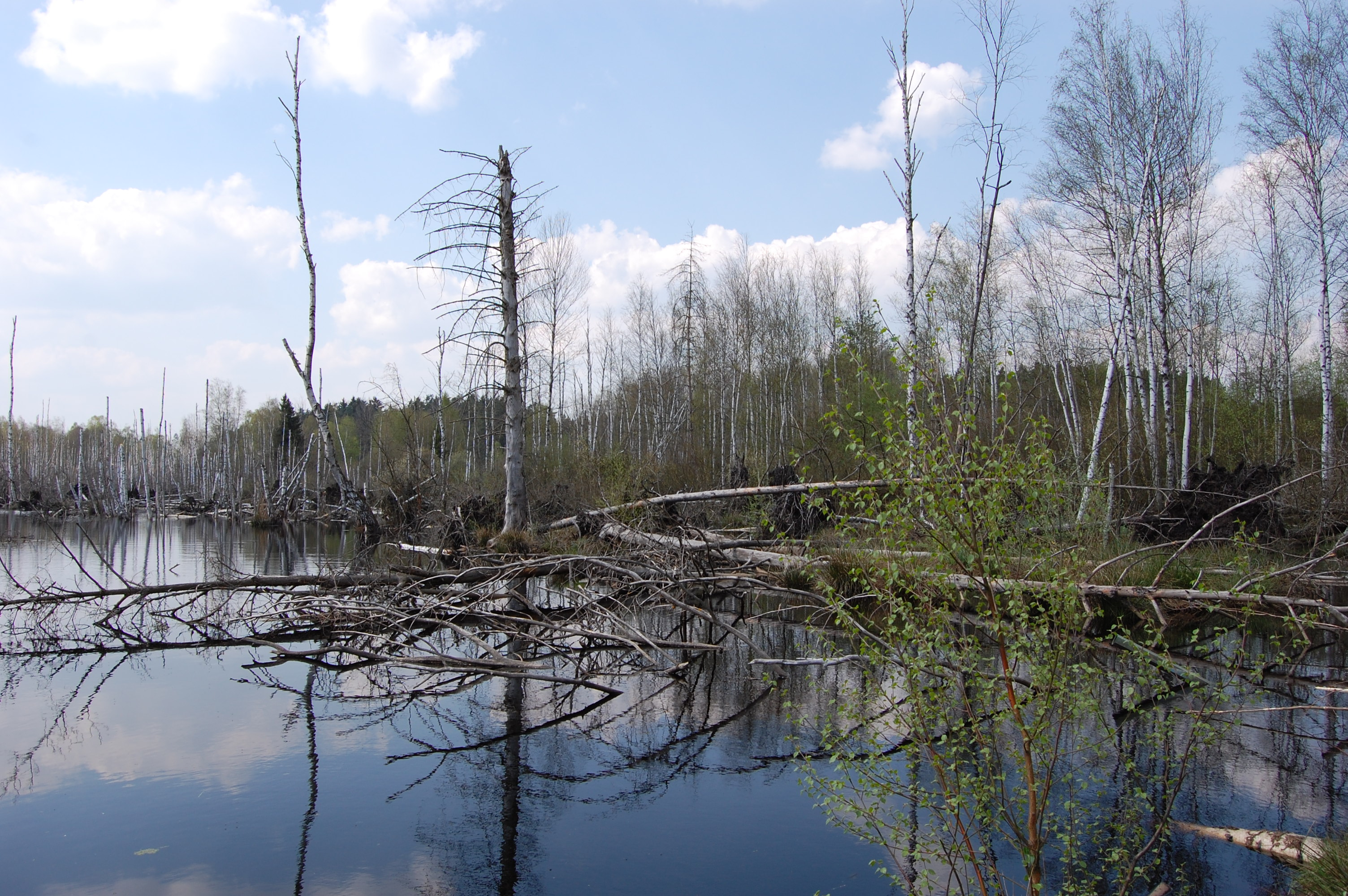 Prackendorfer- und Kulzer Moos bei Kulz, Landkreis Schwandorf, Oberpfalz, Bayern (2011)